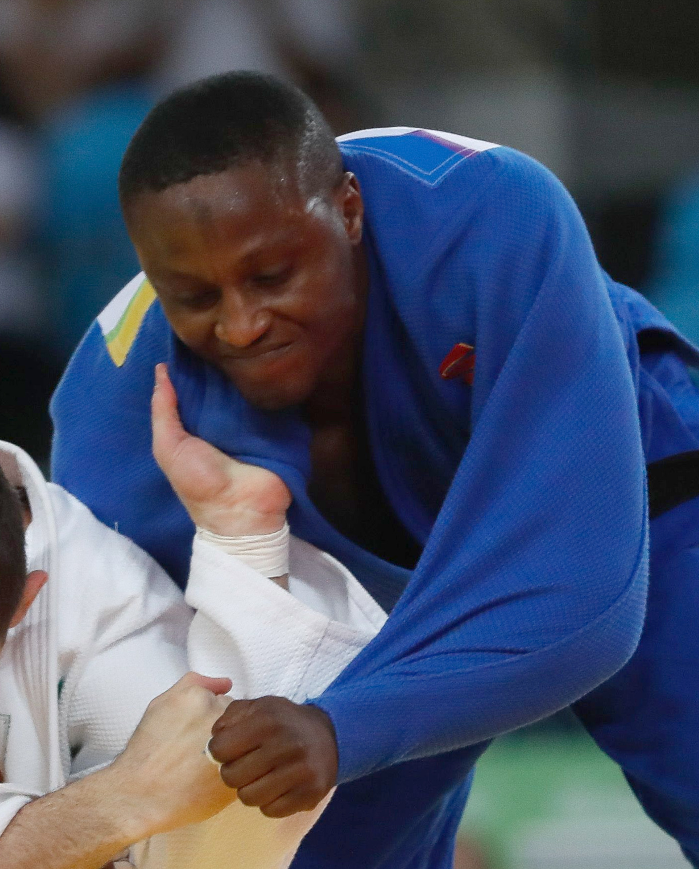 Judô na Arena Carioca dos Jogos Olímpicos Rio 2016. Rio de Janeiro - Victor Penalber, do Brasil, vence Marlon August, de Moçambique, na categoria masculina 81kg do Judô na Arena Carioca dos Jogos Olí­mpicos Rio 2016.